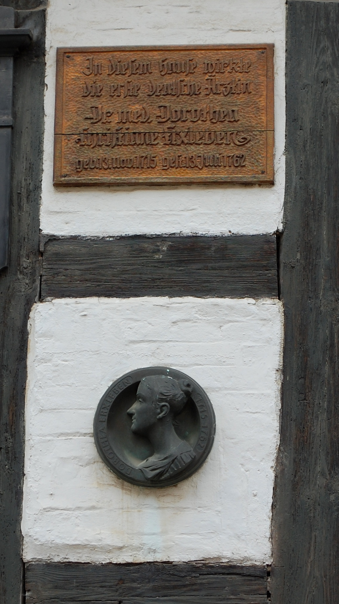 Tafel für Dorothea Erxleben am Haus Kaplanei 10 in Quedlinburg